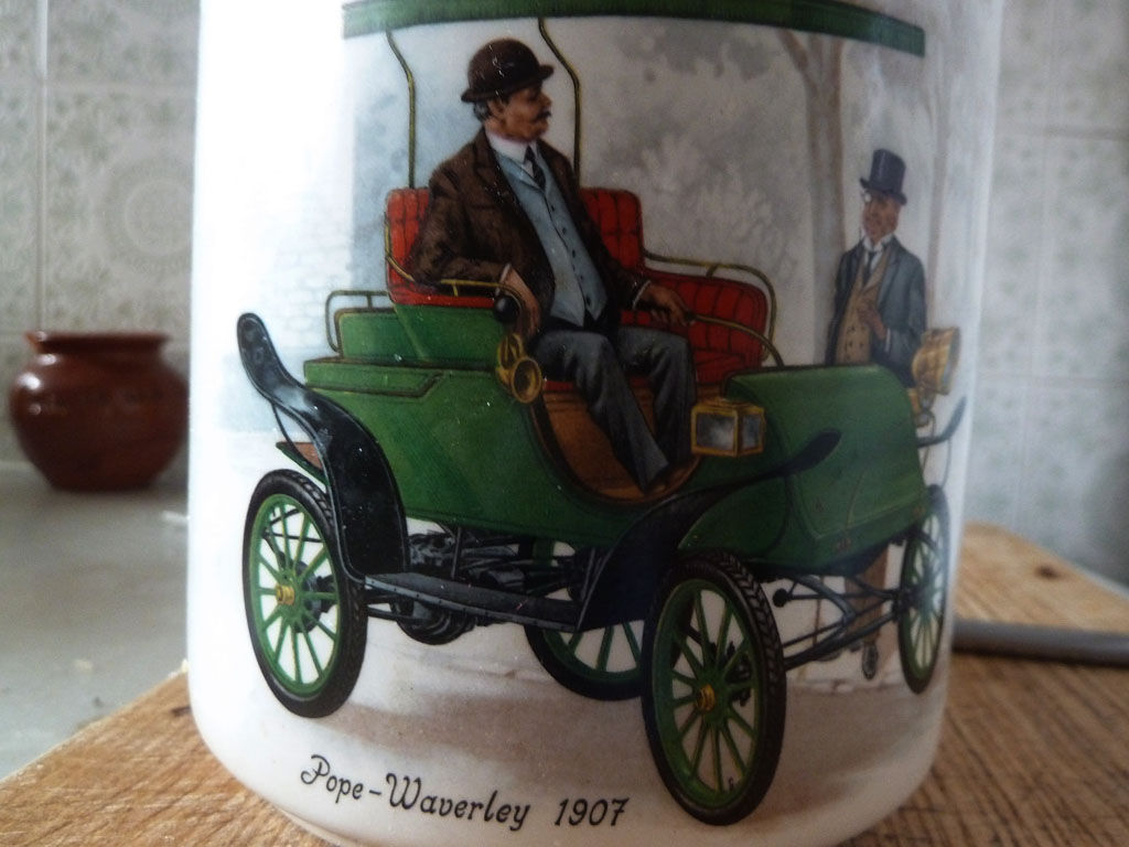 car